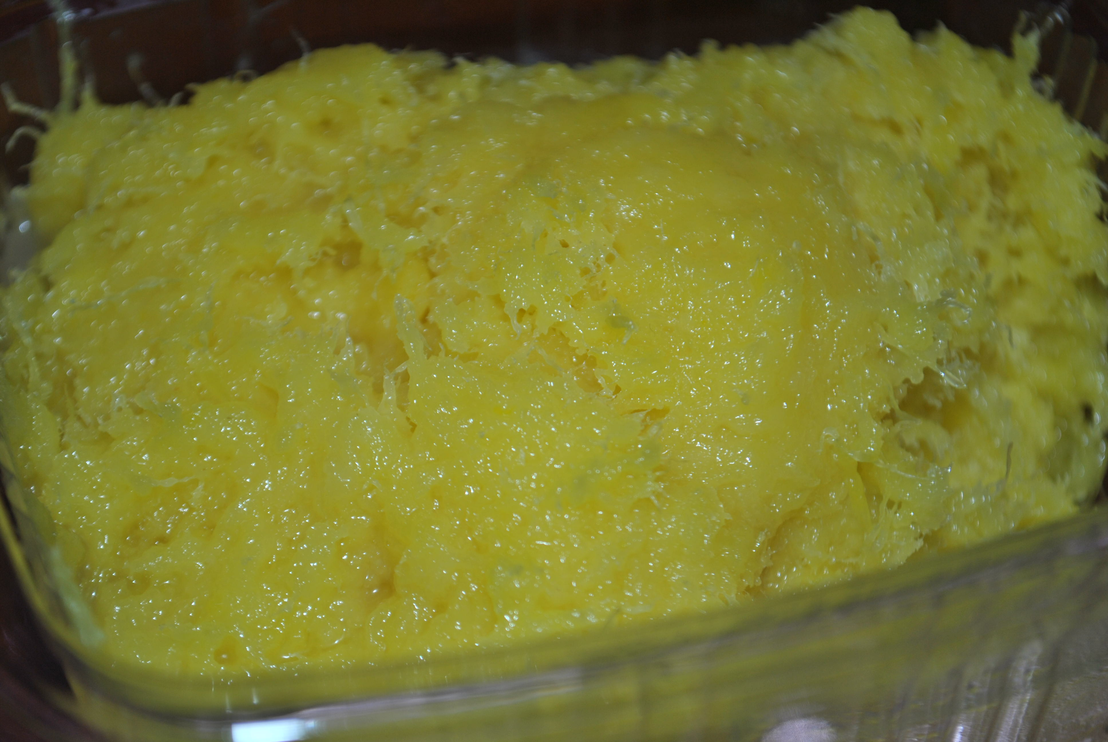 Türk mutfağının tatlılarından Trakya'ya helvası